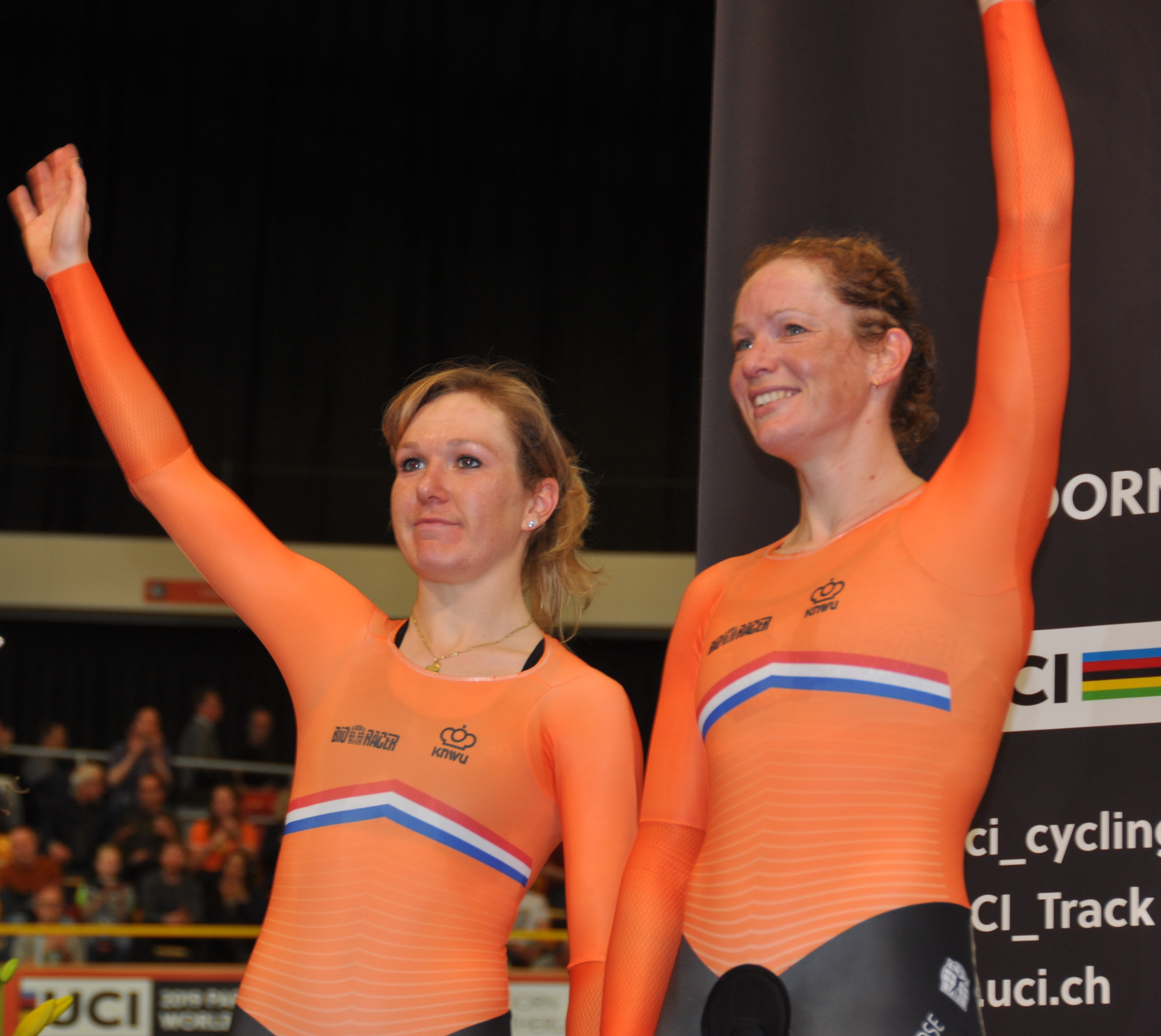 Amy Pieters (l.) und Kirsten Wild, niederländische Radsportlerinnen - Zweite im Zweier-Mannschaftsfahren